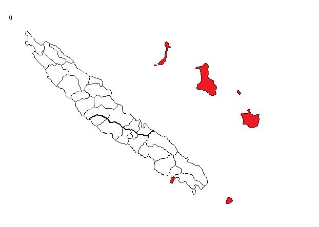 Première circonscription législative de la Nouvelle-Calédonie.